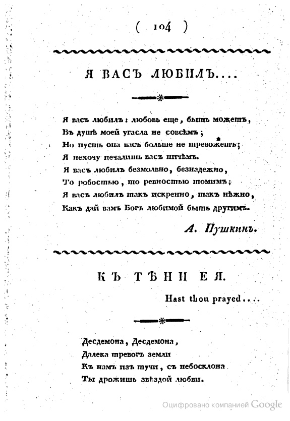 Журнал Северные цветы. Я вас любил, публикация 1830